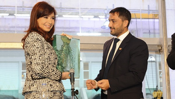 El Intendente de Berazategui Patricio Mussi con la Presidente Cristina Ferndández de Kirchner